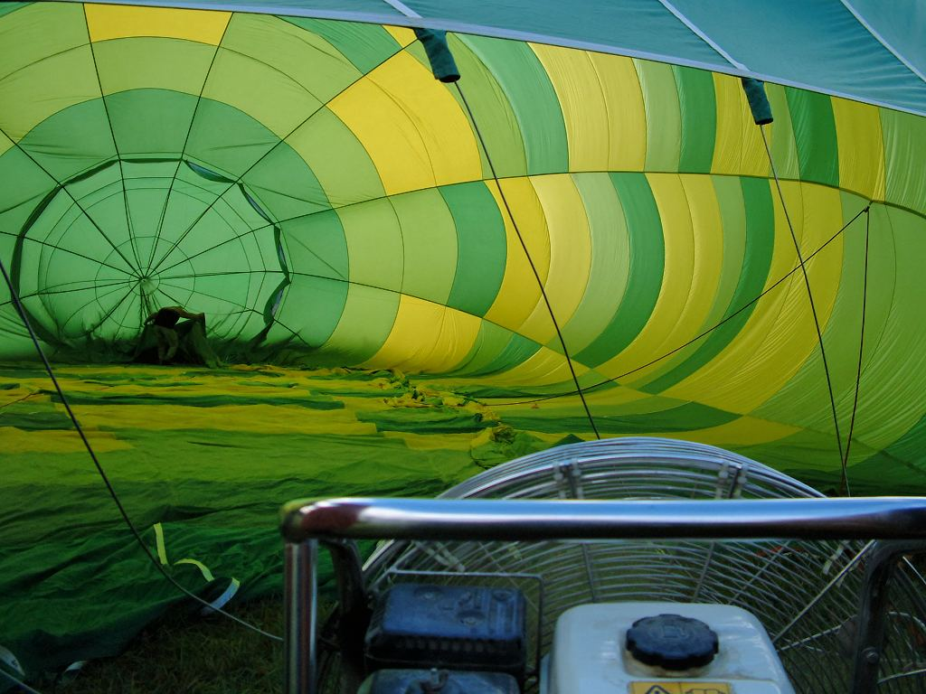 Llenado inicial Descripción: Llenado de un globo aerostático Fecha: 09/11/2002 Hora: 09:57 Cámara: FinePix 6900Z ISO: 100 Tv: 1/320 Av: 3.2 Autor: aTarom